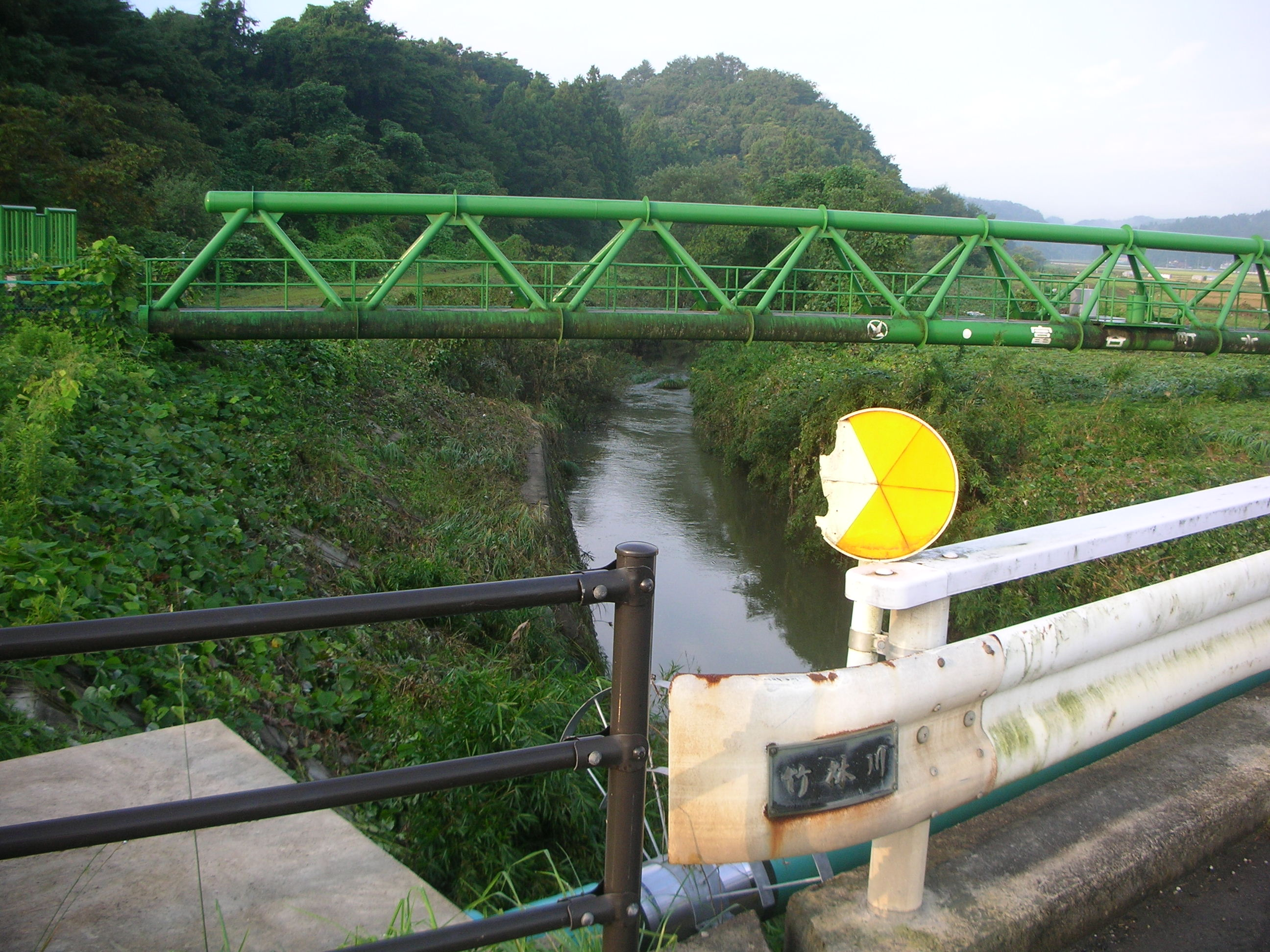 竹林川（吉田川水系）